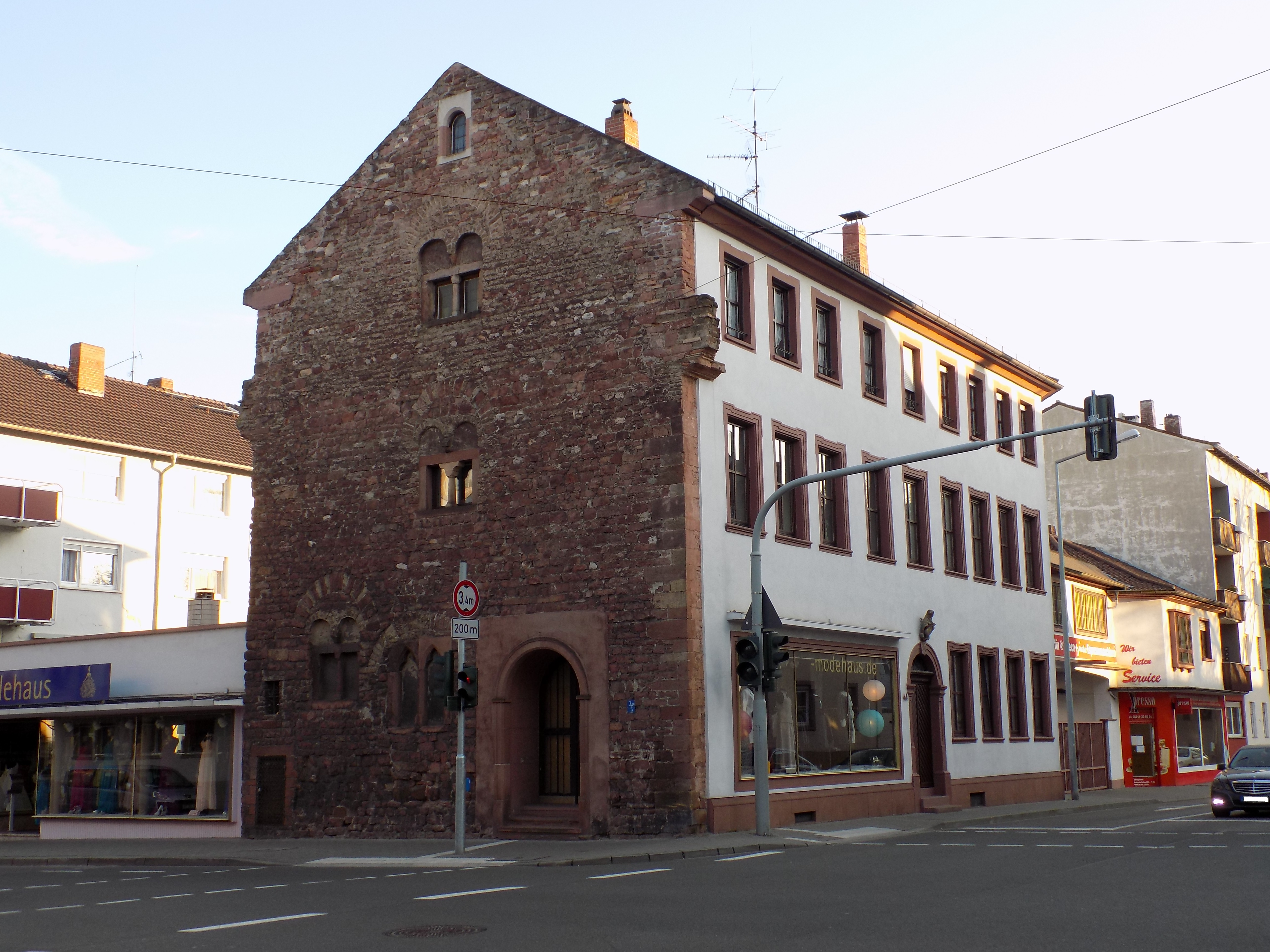 Haus zur Trommel Nordwestansicht